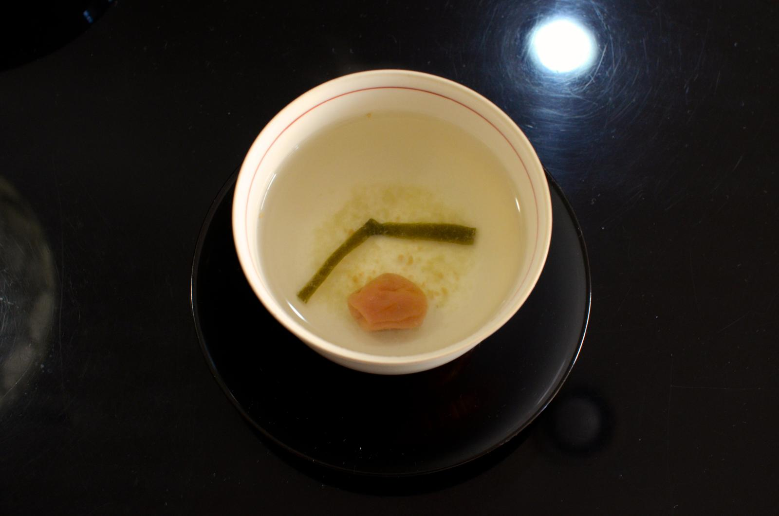 日本のお正月2013_08 福茶